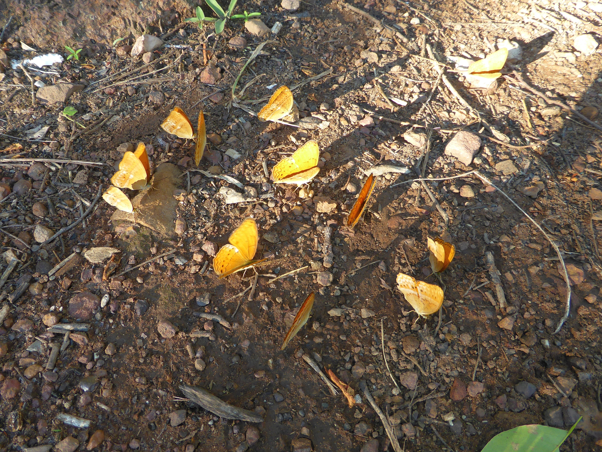 Nationalpark Ta Phraya (Provinz Buriram und Provinz Sa Kaeo), 18.06.2016